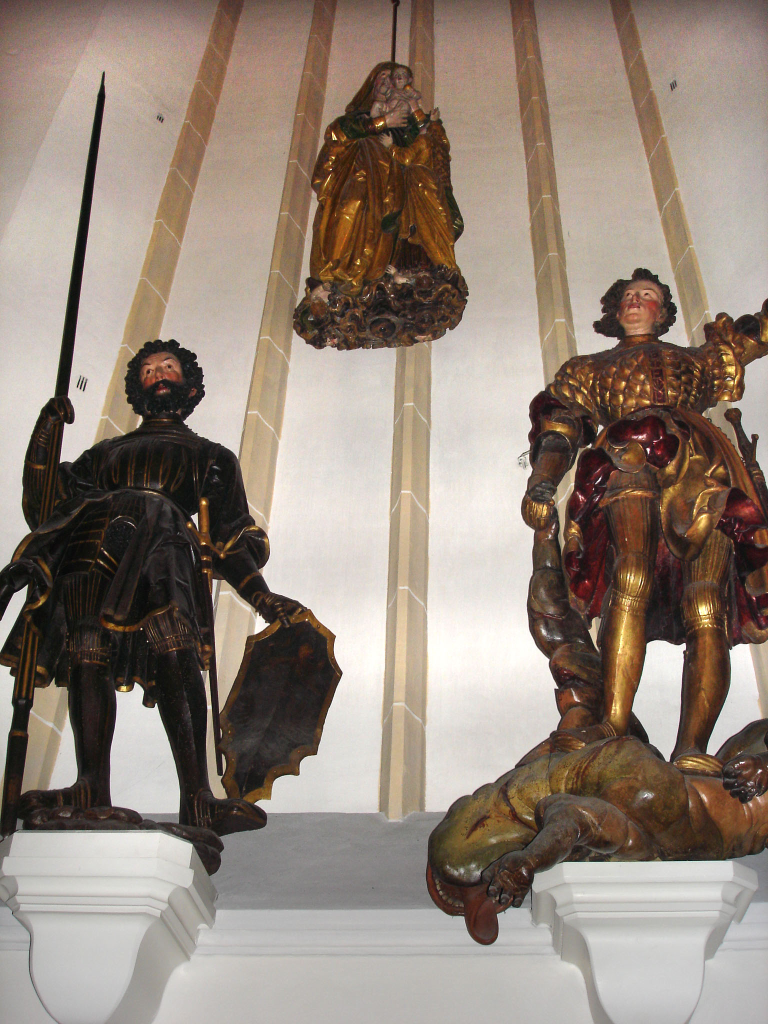 Anna Selbdritt, Rasso und Georg Figuren